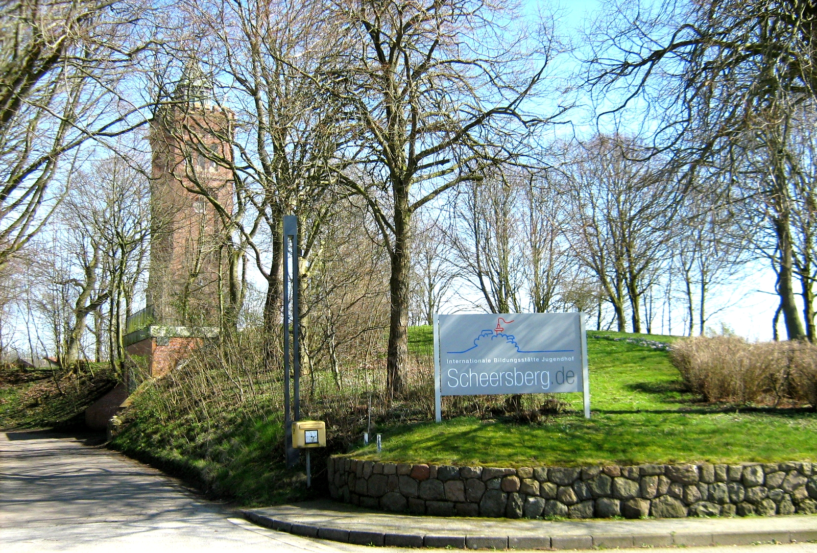 Schild der Internationalen Bildungsstätte auf dem Scheersberg, im Hintergrund der denkmalgschützte Bismarckturm (Denkmalliste Quern Nr.12 Zä.2)